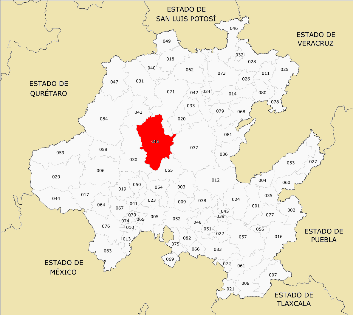 Municipio de Hidalgo